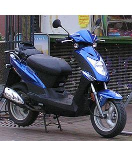 A typical kiosk of the Ruhr area. Ein typischen Büdchen des Ruhrgebiet.